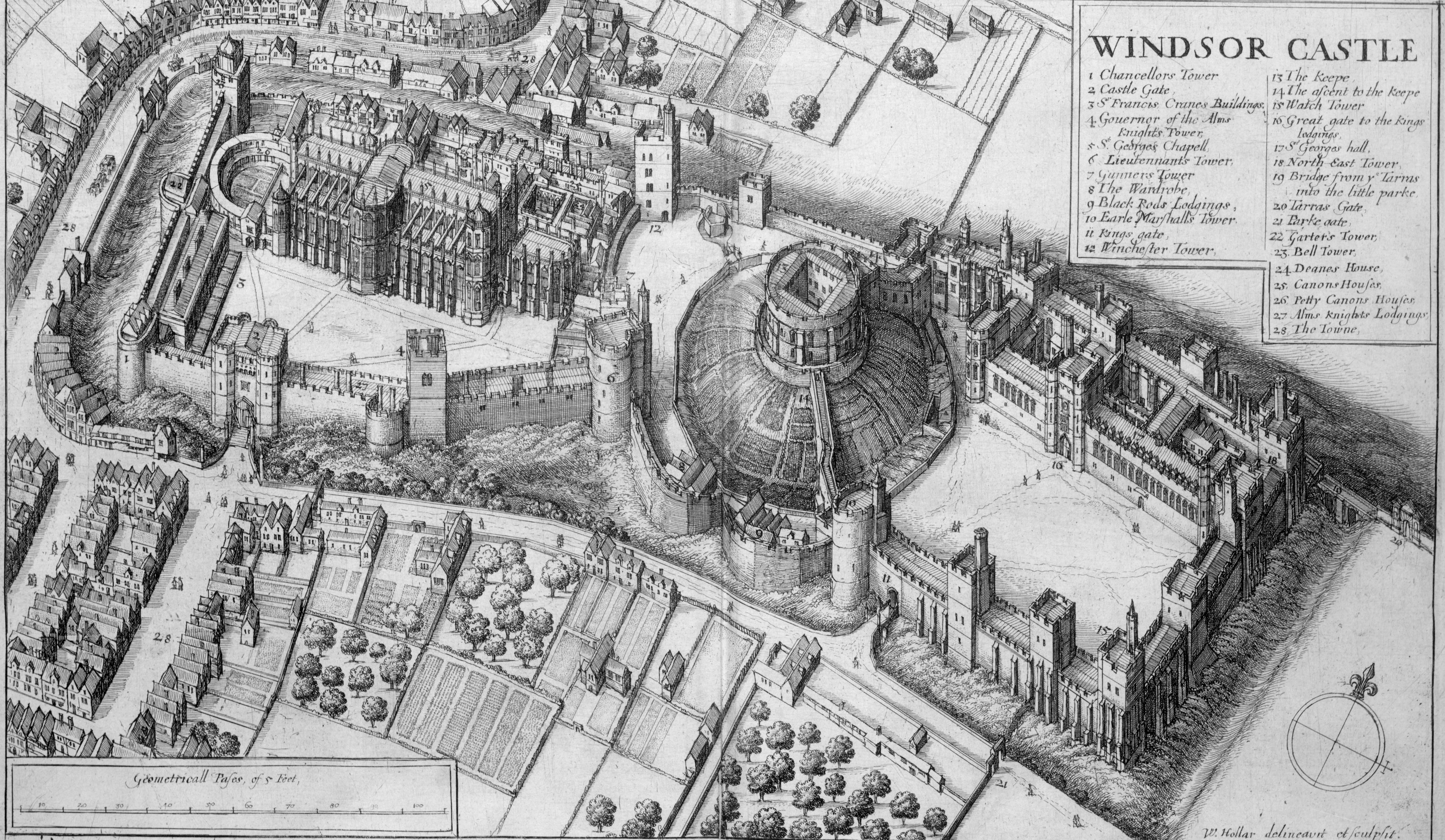 Windsor Castle, birds eye view